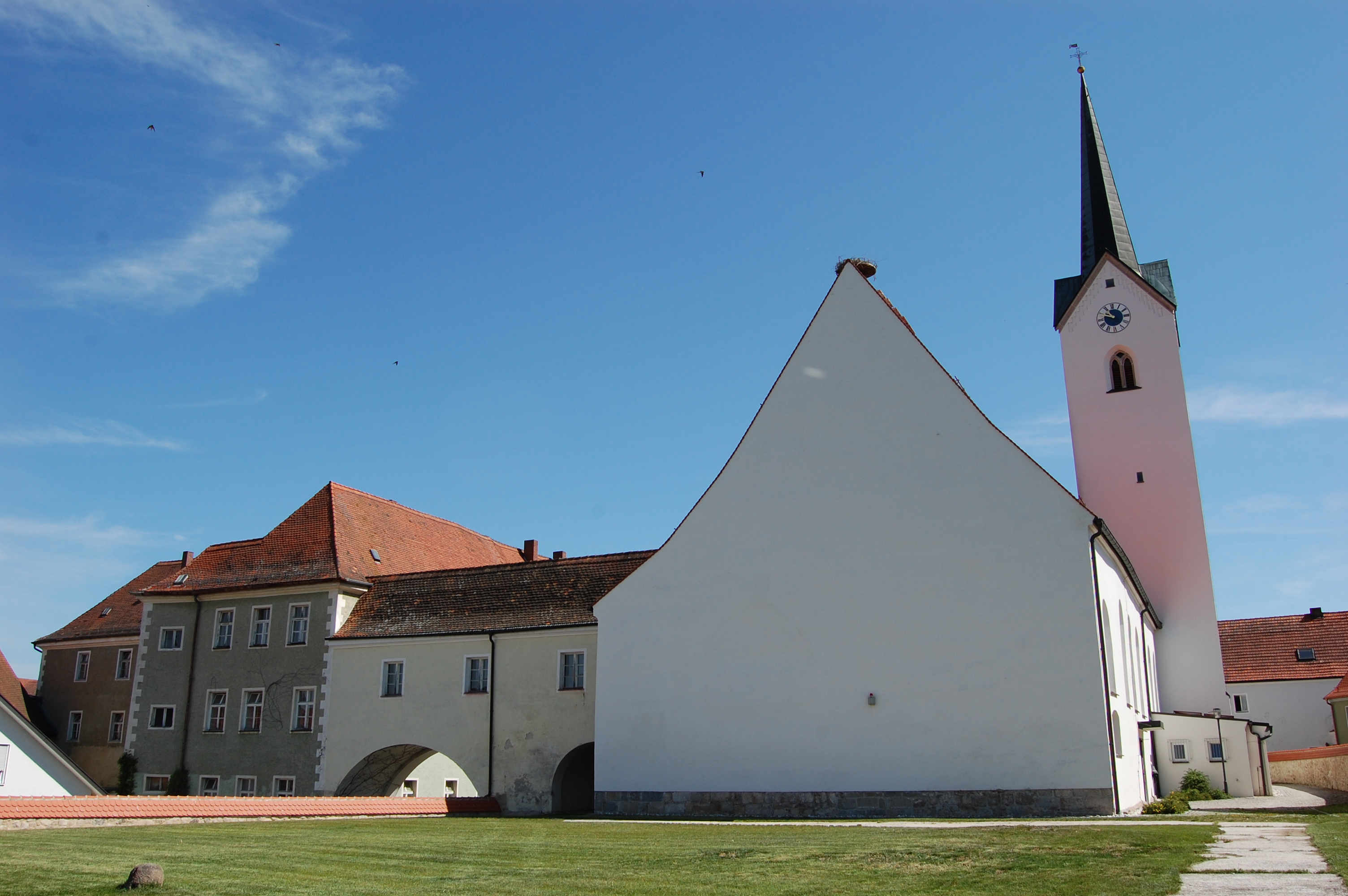 Schwarzhofen, Kirche "Maria vom Siege", links das Kloster der Dominikanerinnen, Landkreis Schwandorf, Oberpfalz, Bayern (2011)